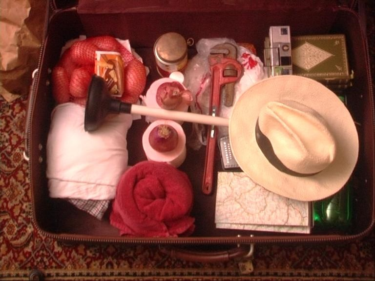 מתוך מיצב הוידאו "בעקבות דר רוברט לוי"